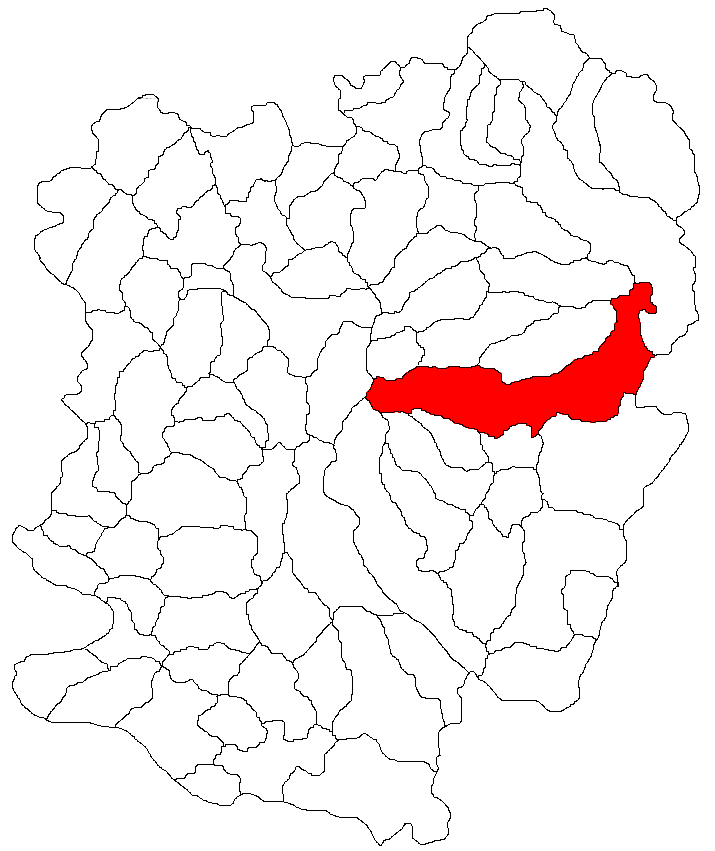 Categorie:Hărţi ale judeţului Caraş-Severin